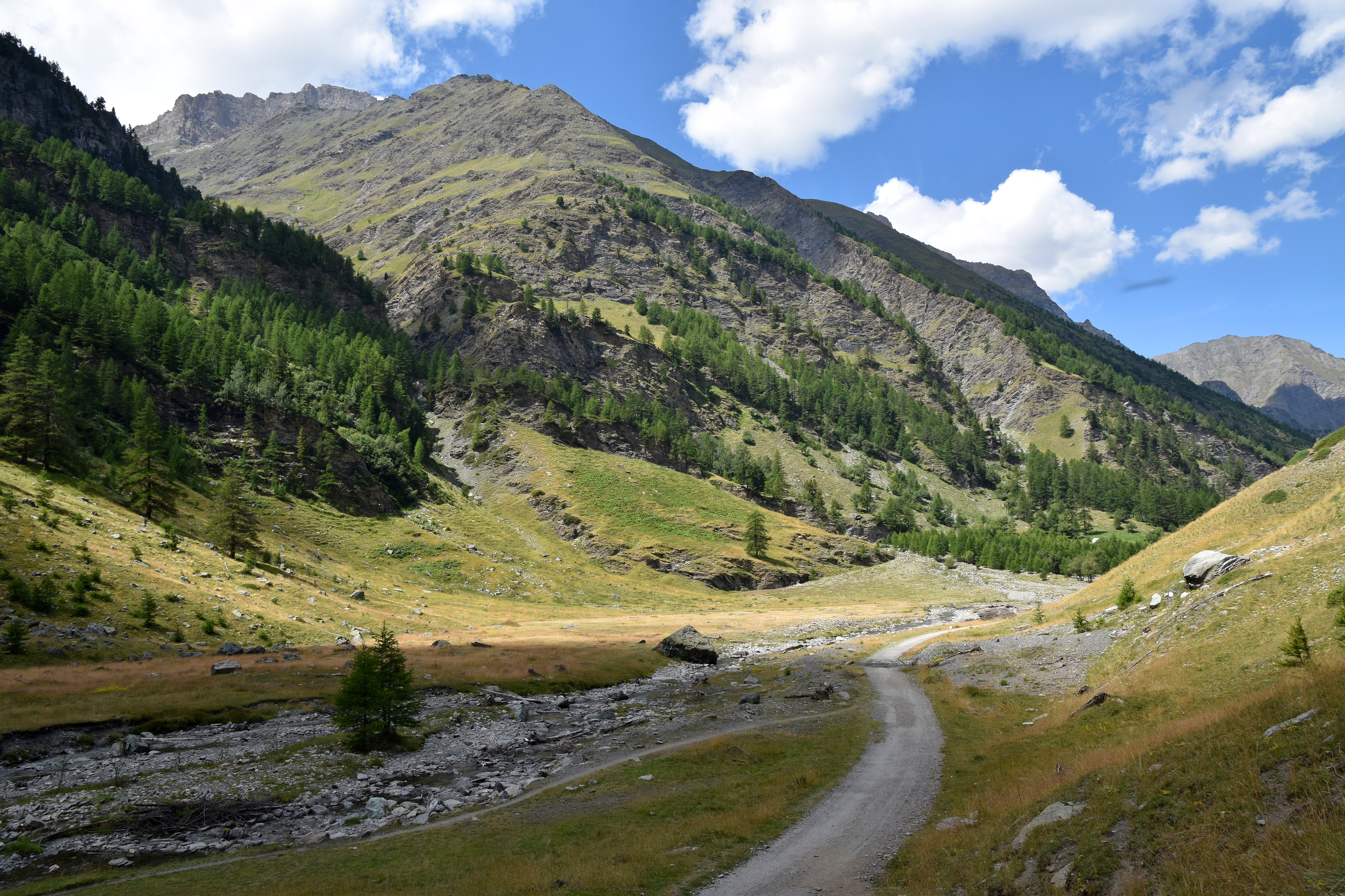 Vallée du Guil, Hautes-Alpes, France (Queyras) en amont de Roche écroulée